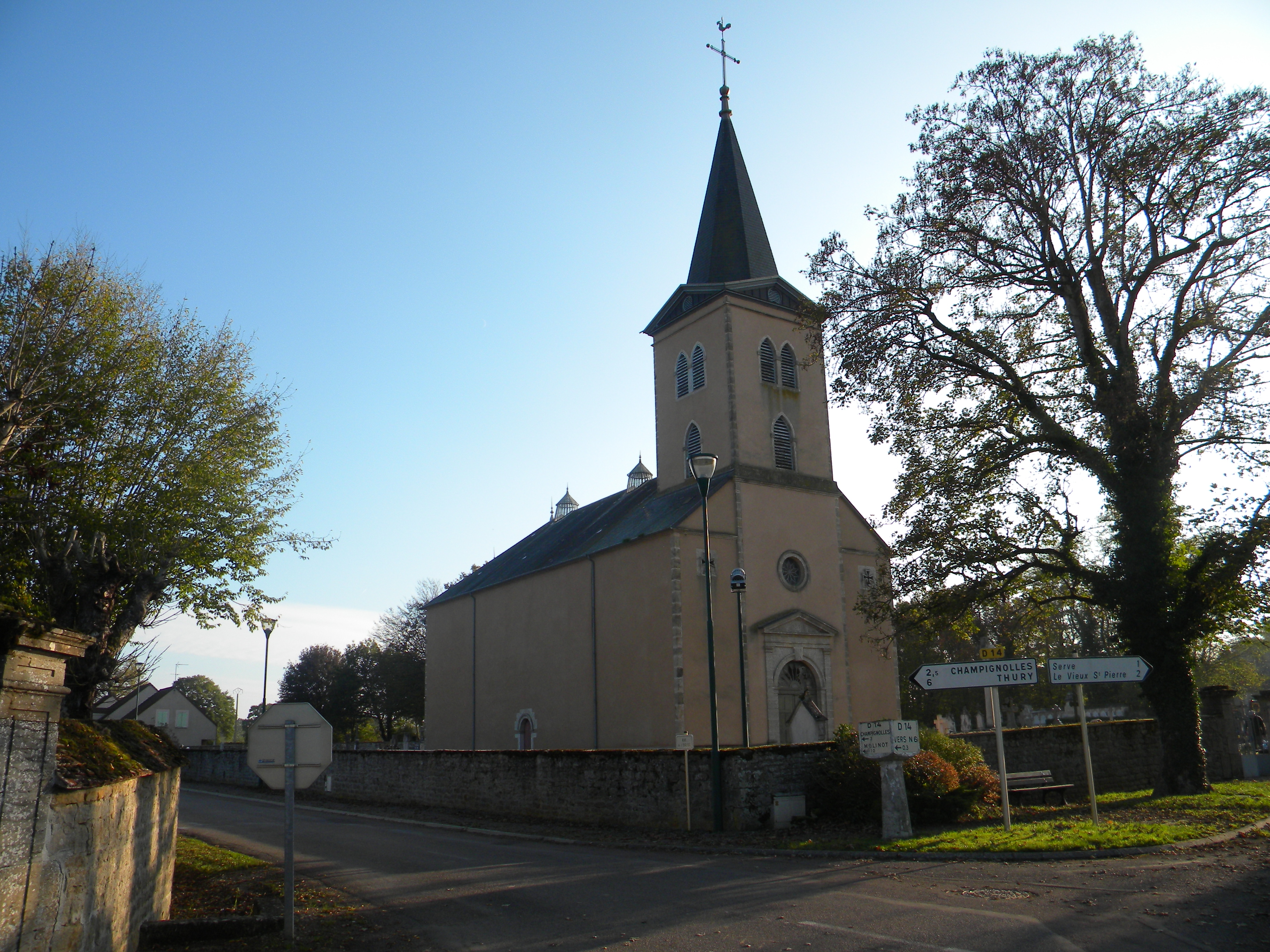 Preĝejo se Lacanche (Francio)